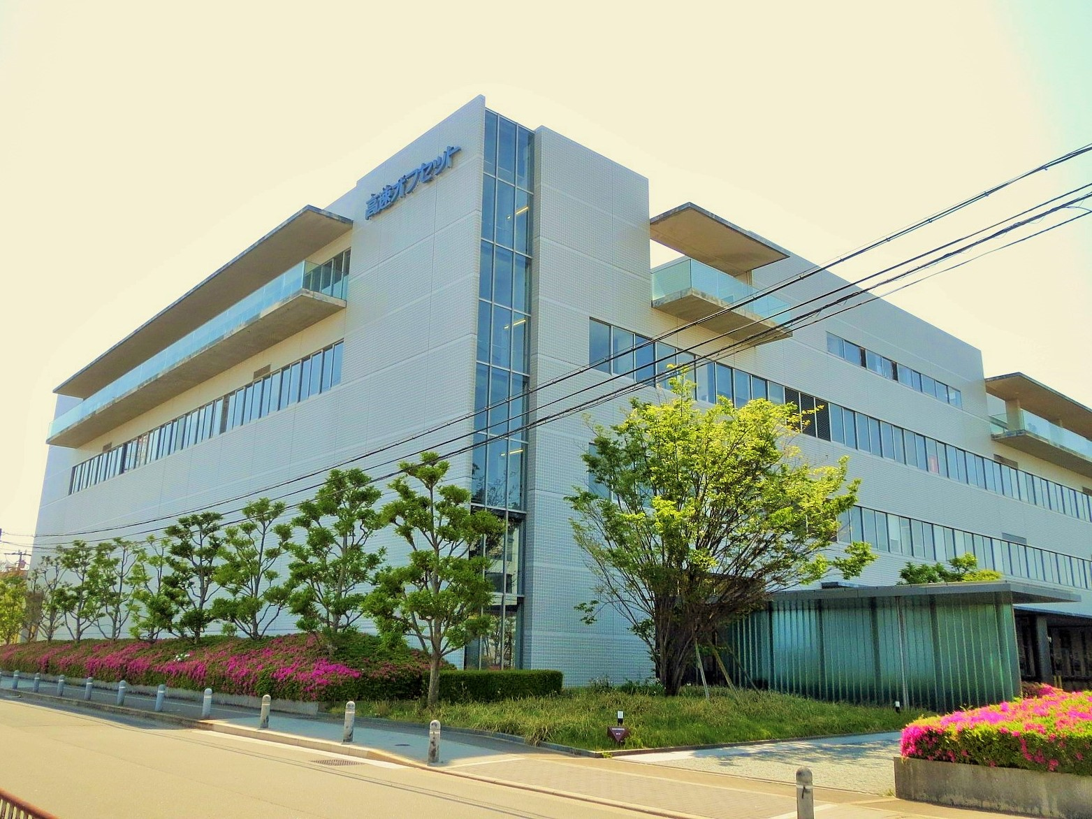 大阪まちなみ賞受賞